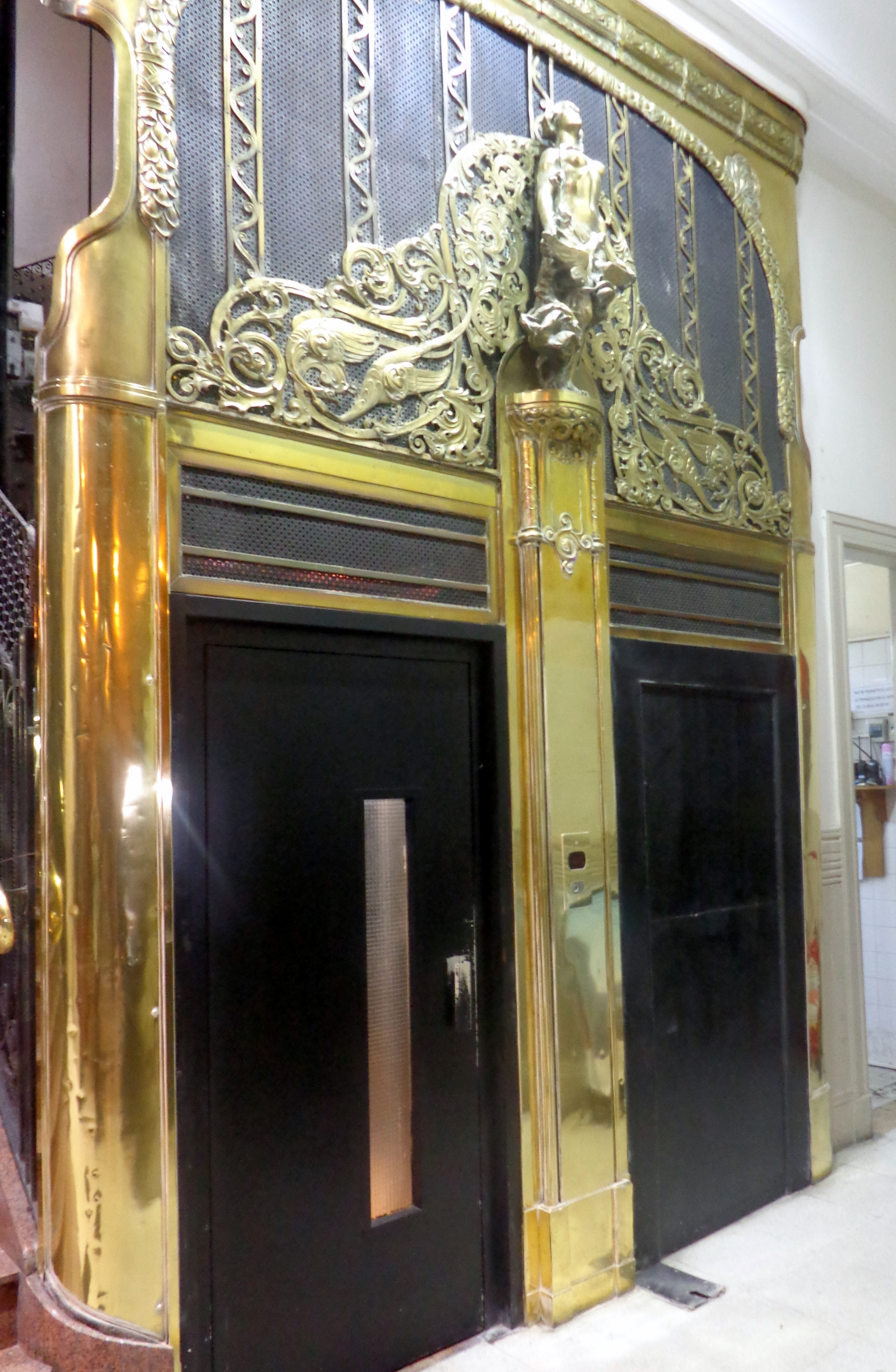 Galería Güemes